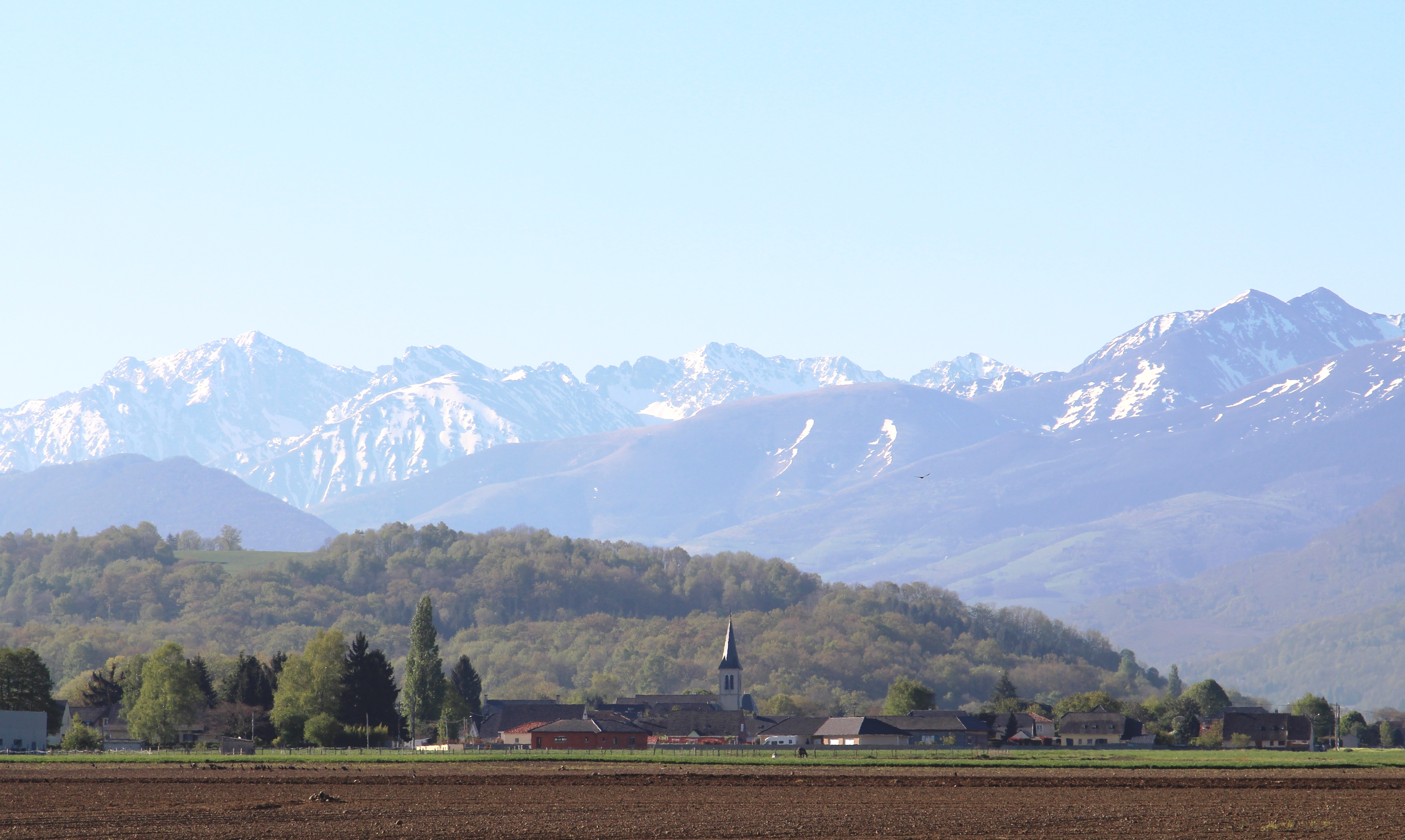 Vielle-Adour (Hautes-Pyrénées)